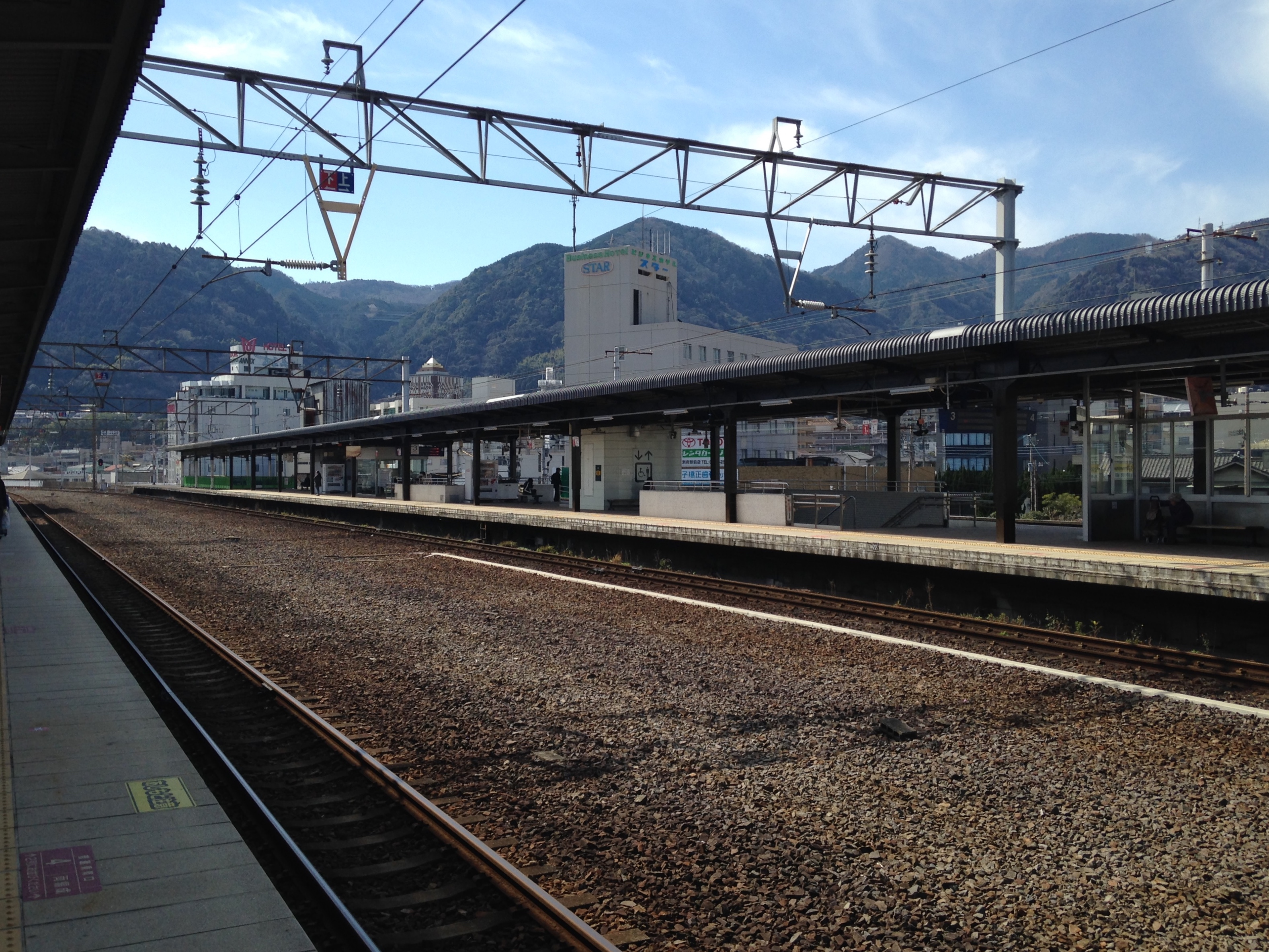 別府駅のホームより望む日豊本線(東別府方面)